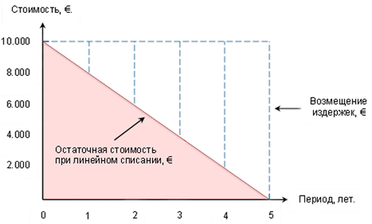 Эффект высвобождения капитала